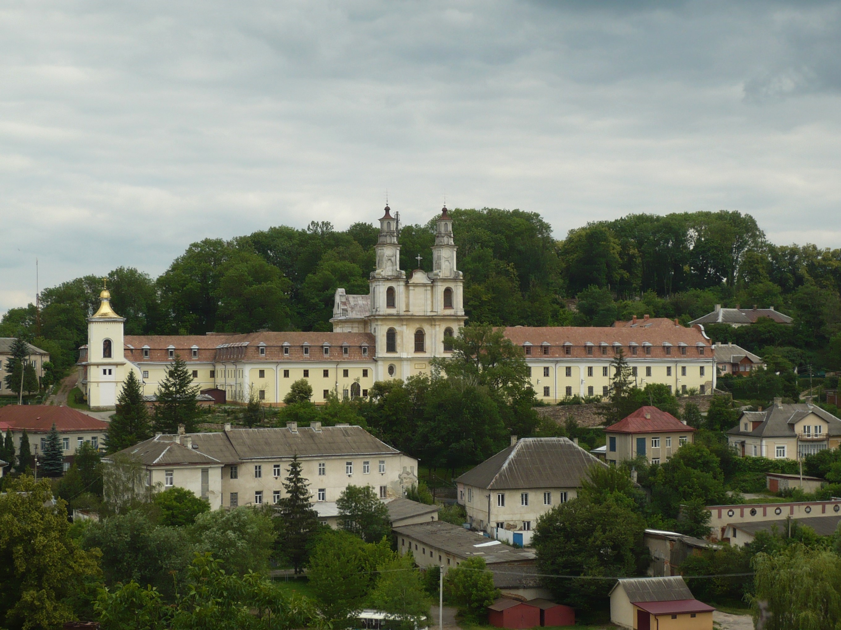 Buczacz.Bazylianie